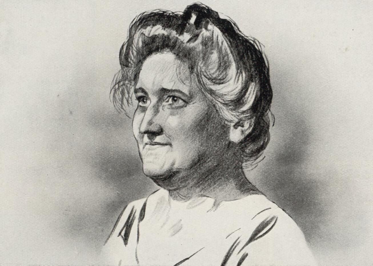 Portret van Wilhelmina Maria Bosch Reitz (1870-1950), anoniem. Tekening, potlood, waterverf.